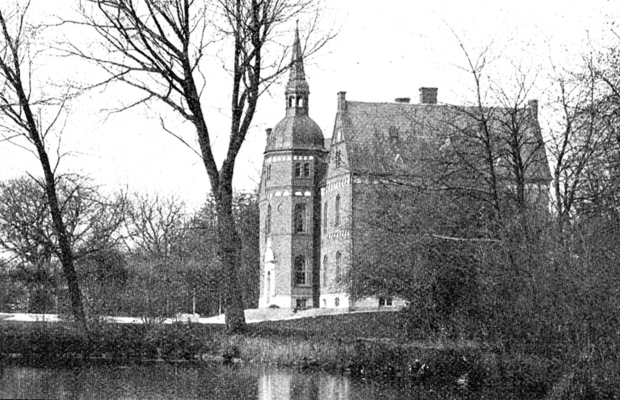 Skovsgård er en gammel gård, som første gang nævnes i 1457. Gården ligger i Humble Sogn, Langelands Sønder Herred, Sydlangeland Kommune. Hovedbygningen er opført i 1887-1889